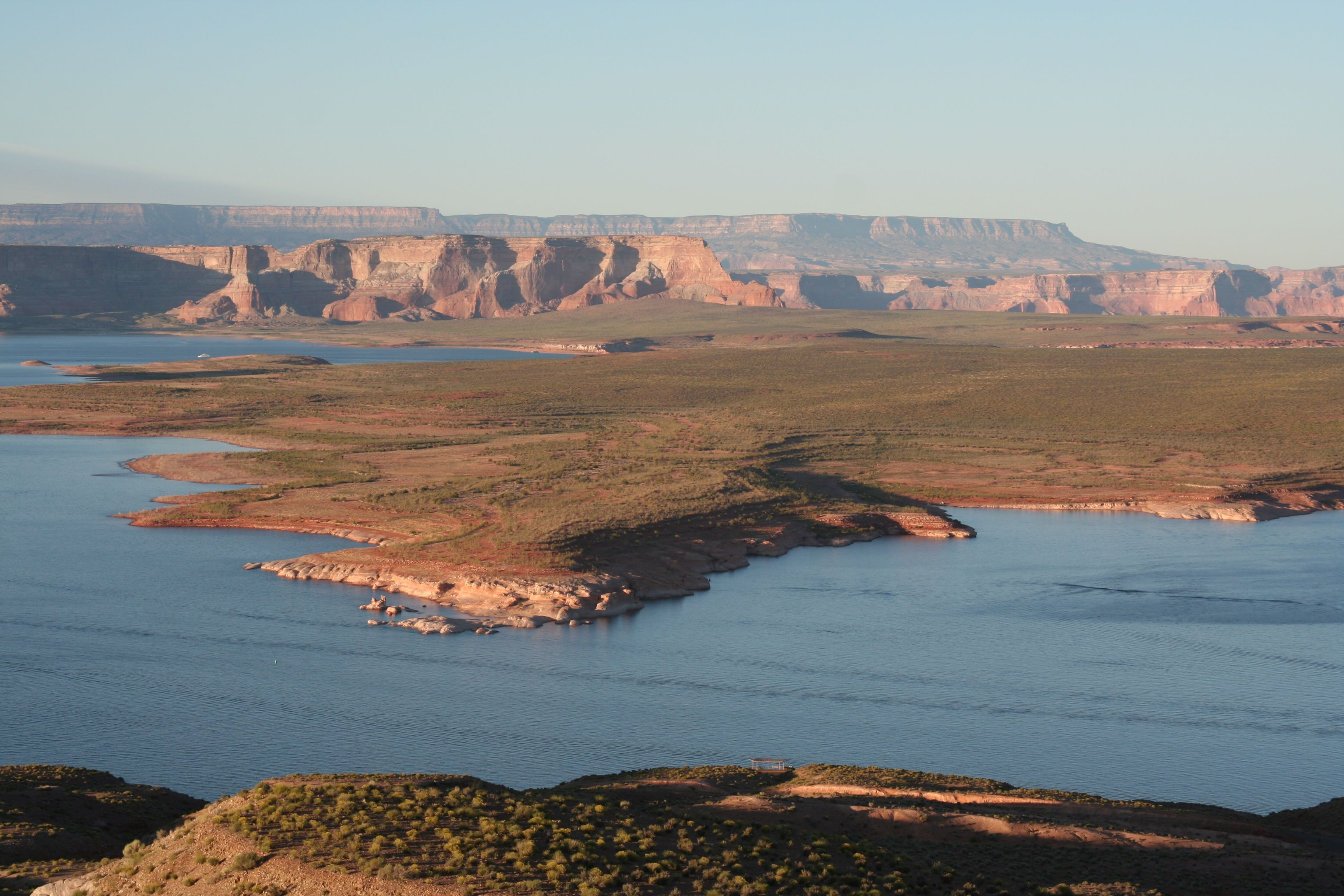 Antelope Island at Lake Powell and Fiftymile Bench